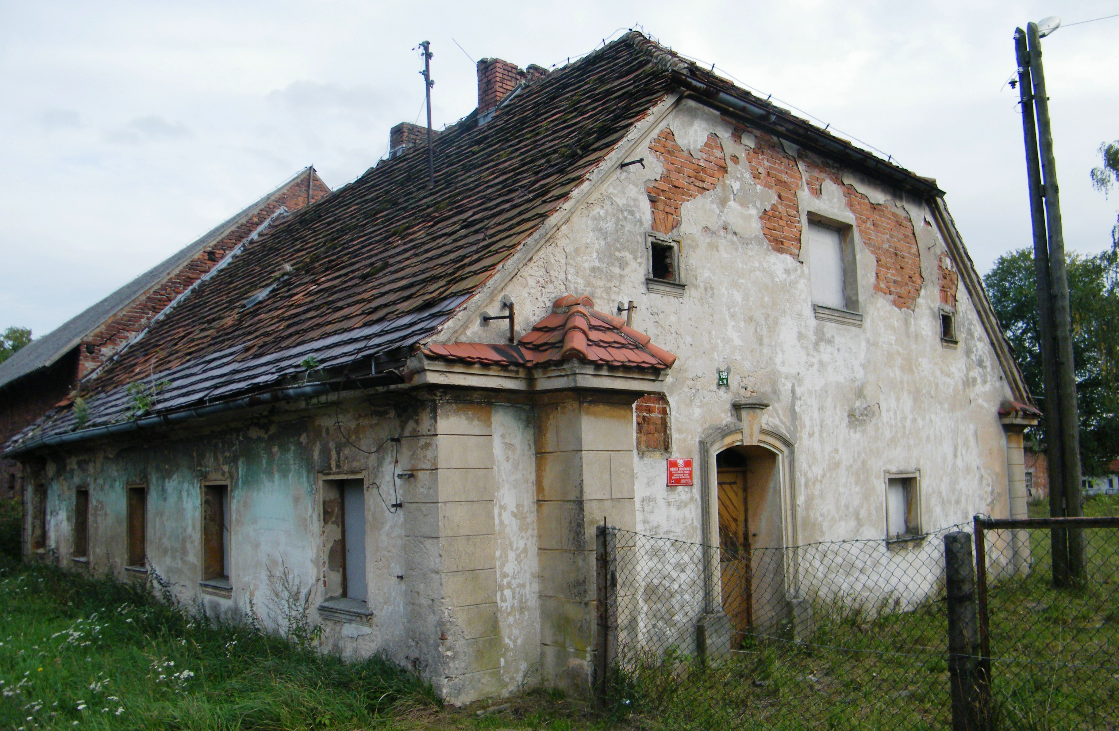 zespół pałacowy, XVIII-XIX Tuły, gmina Lasowice Wielkie